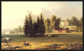 Sälinkään kartano Sälinkää Manor Mäntsälä